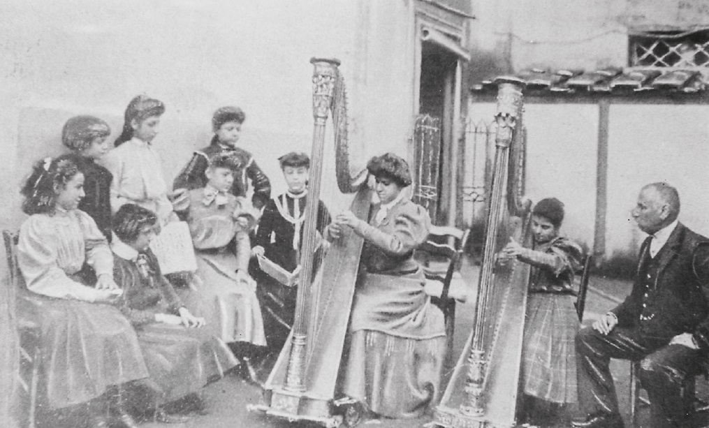 Giovanni Caramiello avec ses élèves